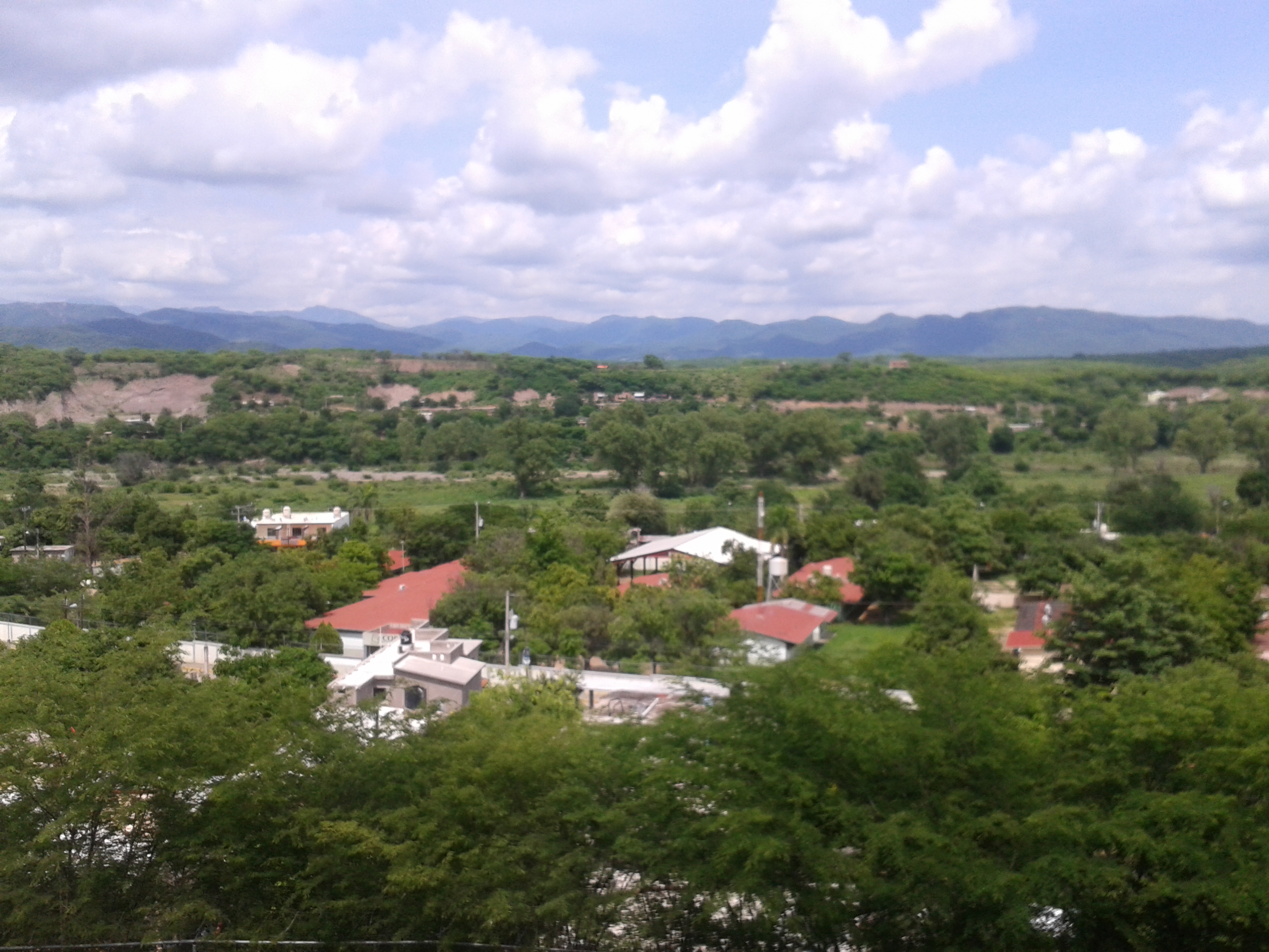 Badiraguato